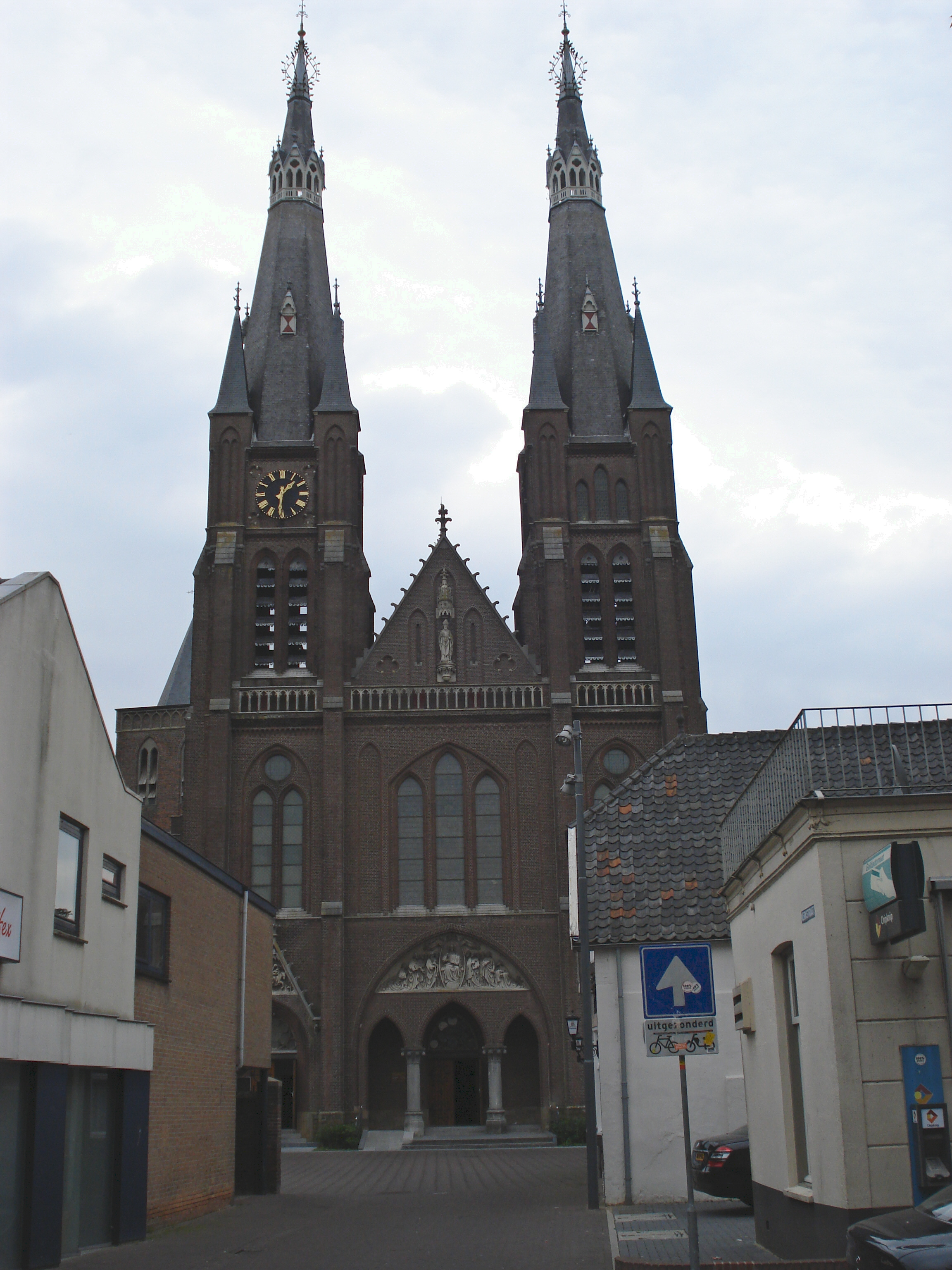 Cuijk, l'église Saint Martin